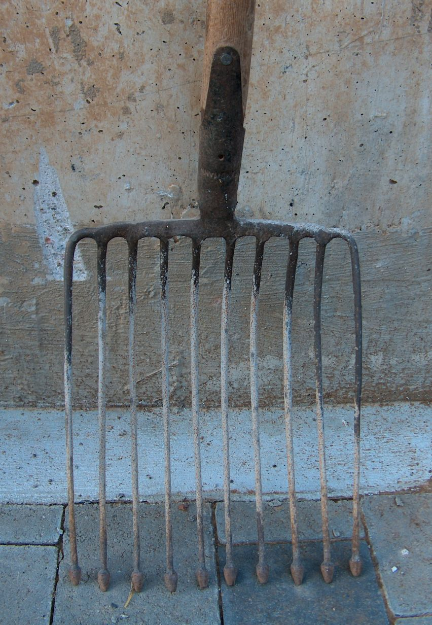 Rübengabel